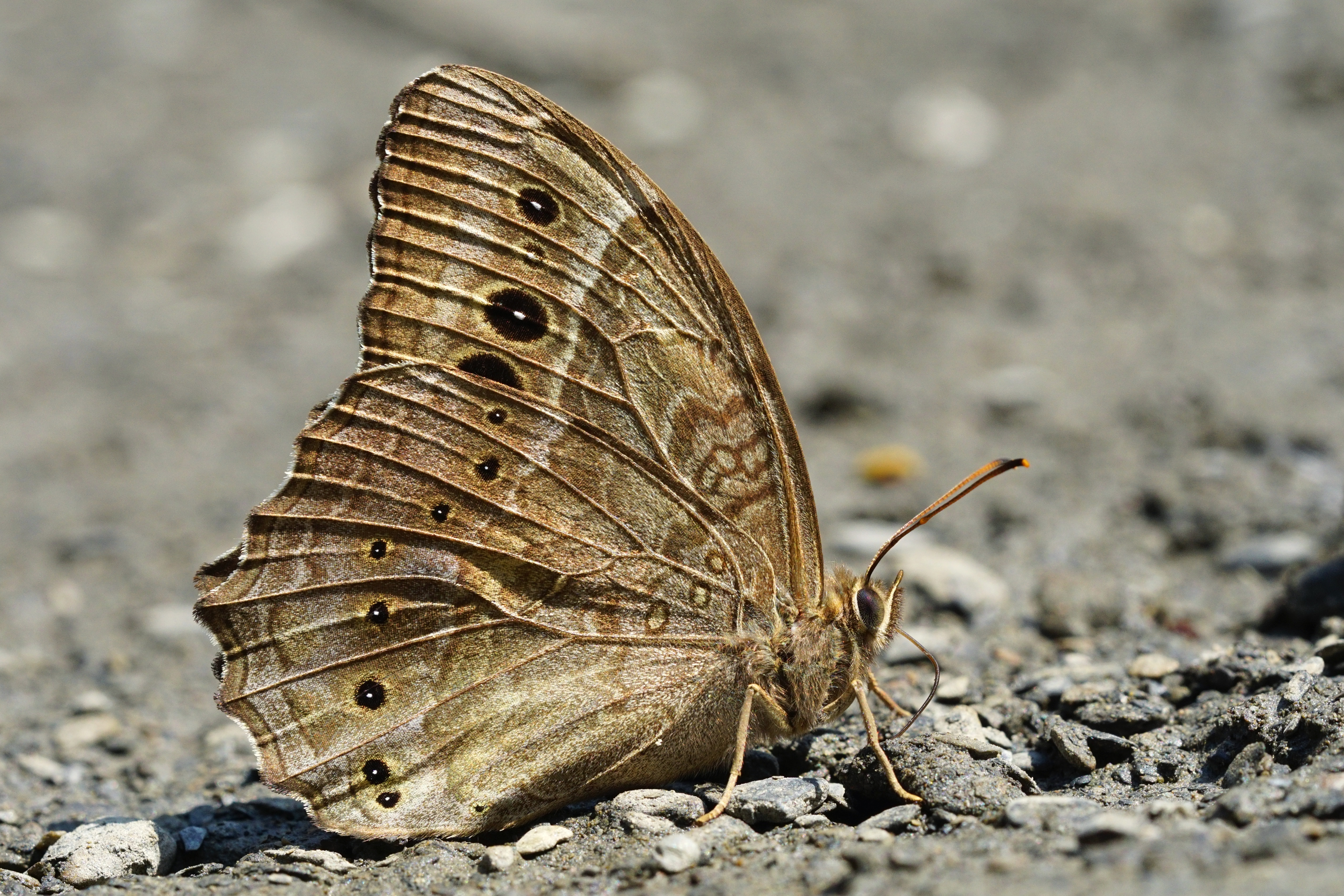 褐翅蔭眼蝶 Neope muirheadi nagasawae